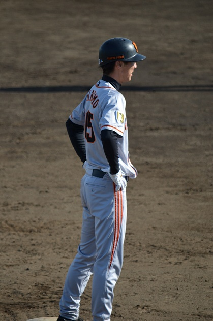 丸毛謙一選手